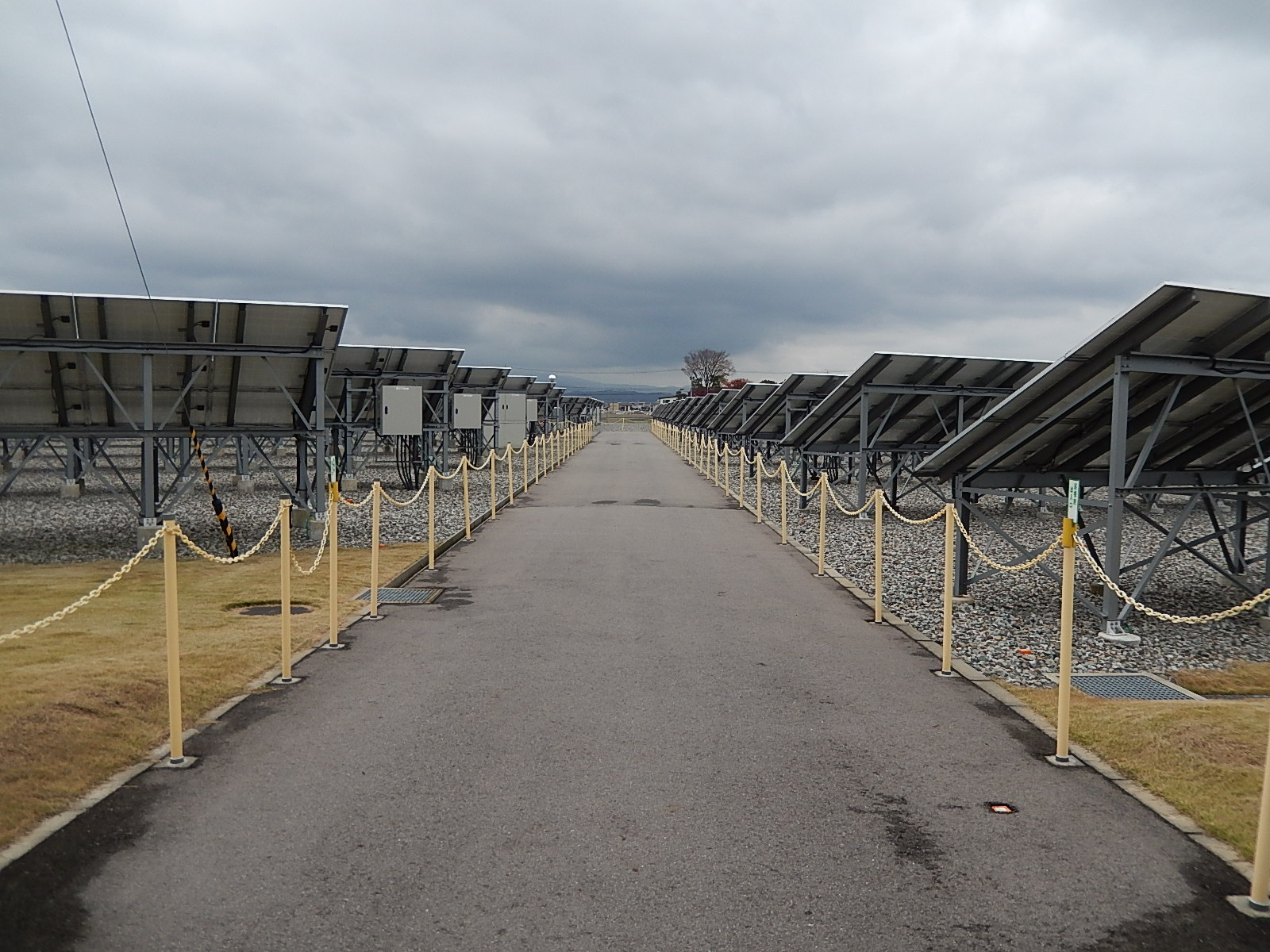 富山市（JR高山線速星駅）に設けられた北陸電力の太陽光発電所